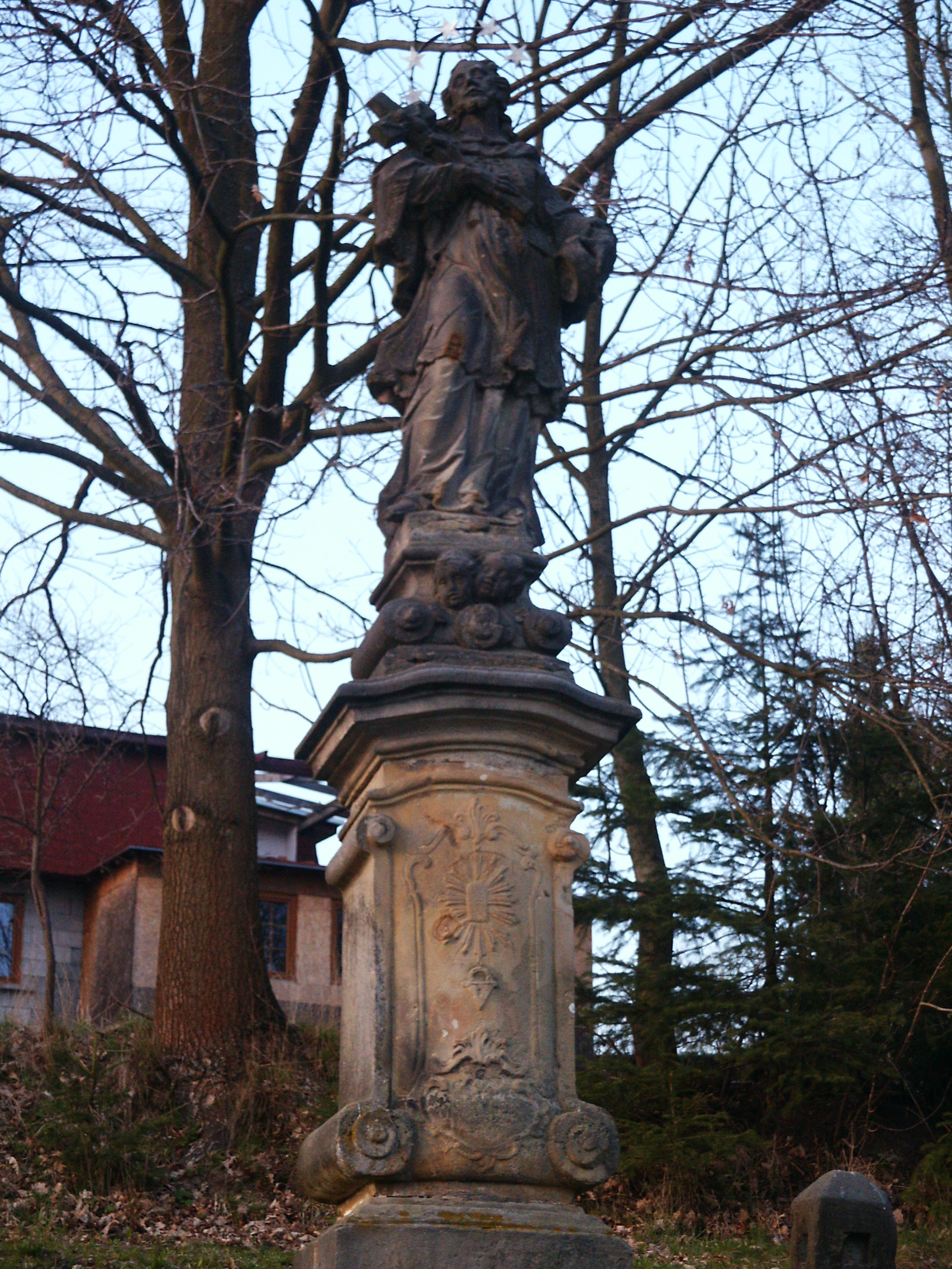 Drštěkryje - socha sv. Jana Nepomuckého